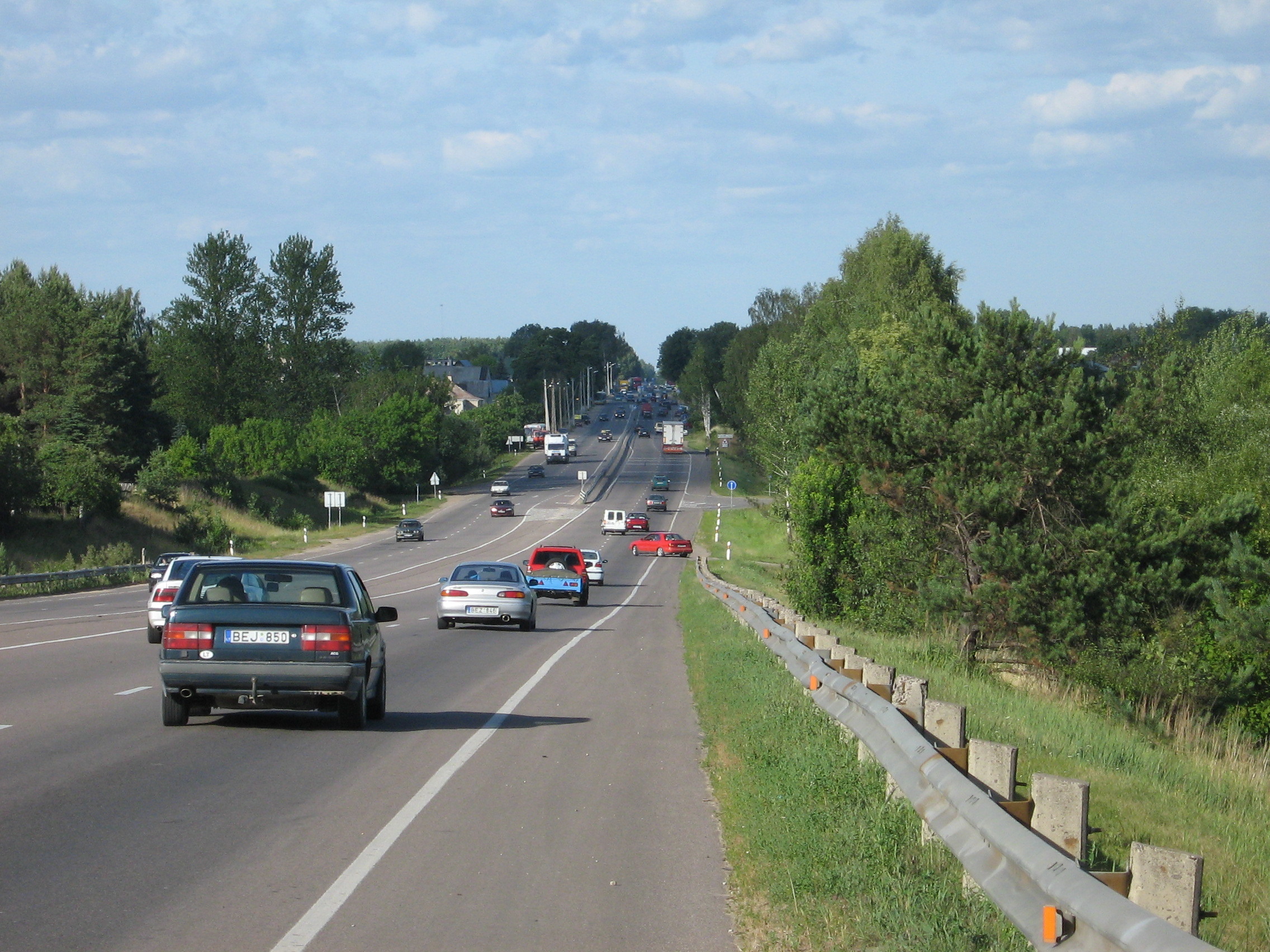 Kelias į Karmėlavą.